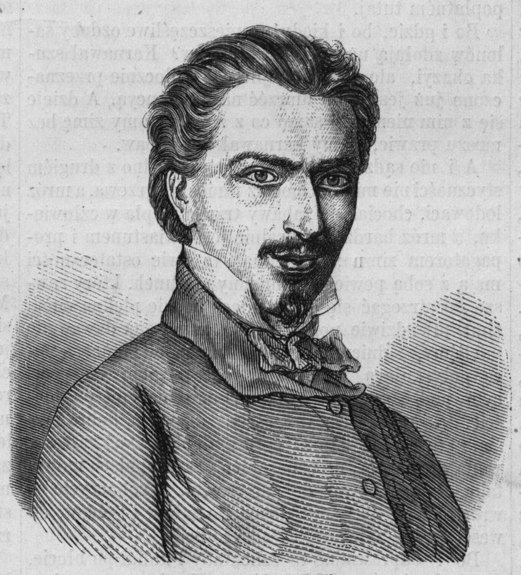 Portret Leona Szuberta rysował Eliasz z Krakowa, natomiast rytował G. Rober w drzeworytni „Tygodnika Ilustrowanego”. Skan portretu z nr 16 z 14 stycznia 1860 r. z „Tygodnika Ilustrowanego” wykonał Andrzej Kobrzyski z Uniwersytetu Mikołaja Kopernika w Toruniu.